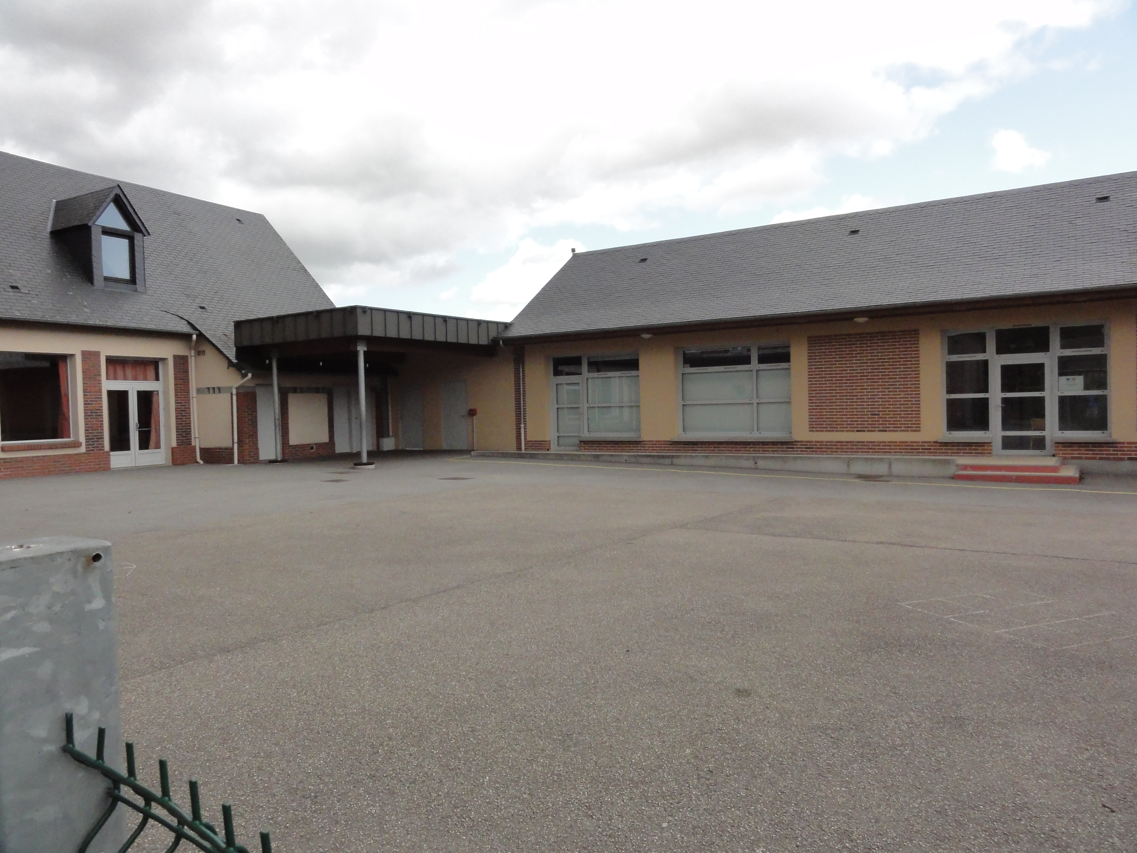 Boudeville (Seine-Mar.) salle polyvalente